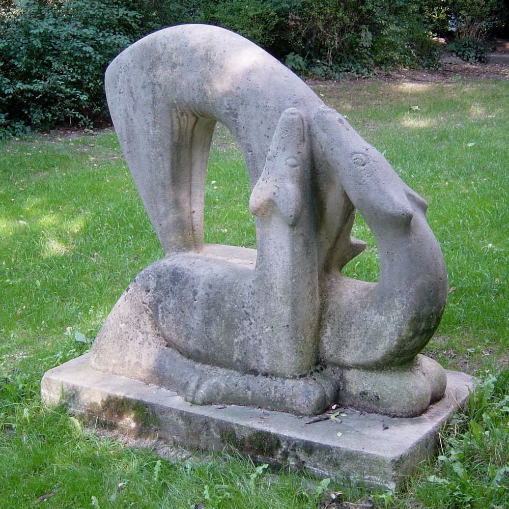 Skulptur "Rehe" (1968) von Anatol Buchholtz, Rimpaus Garten, Braunschweig